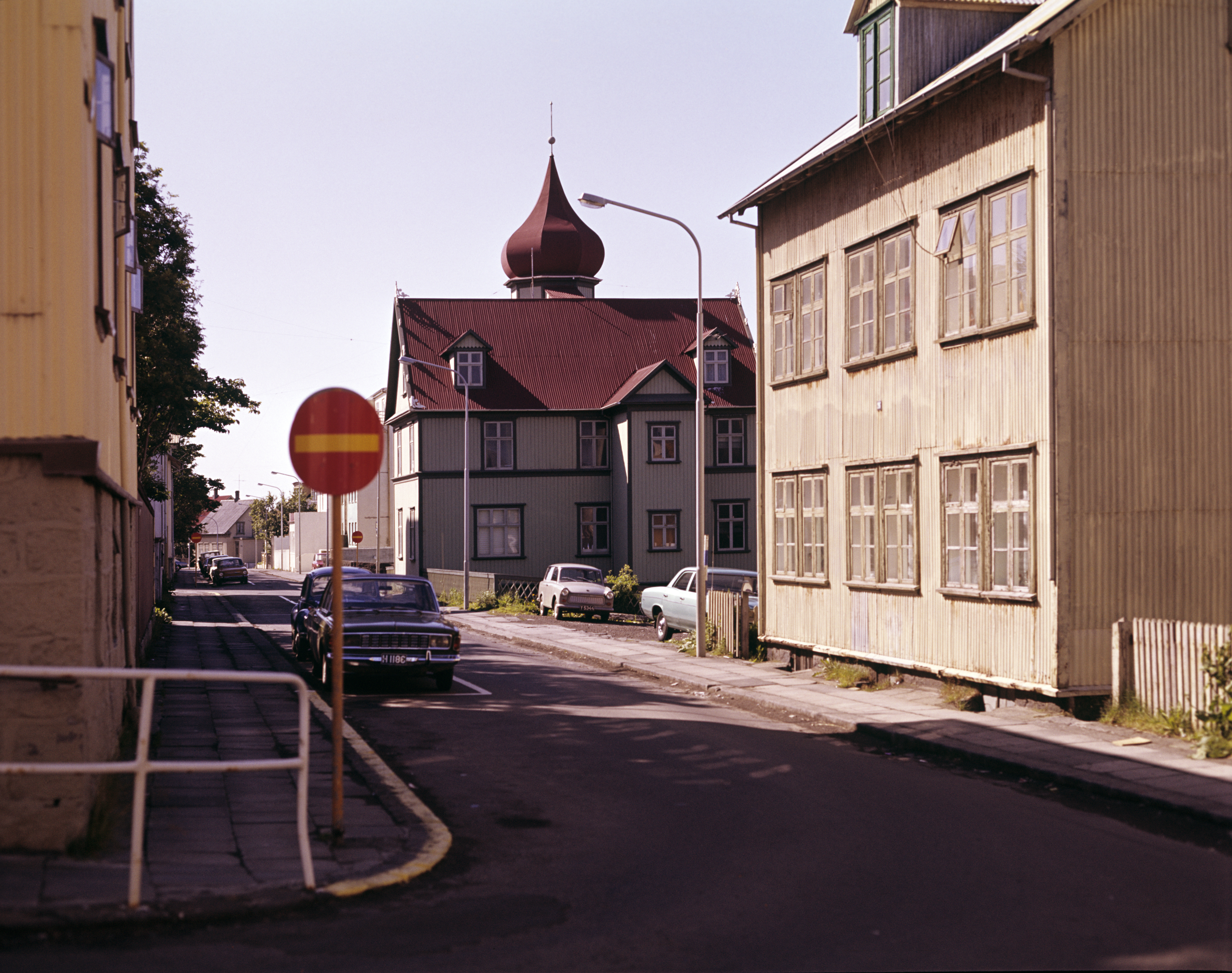 Þingholtstræti